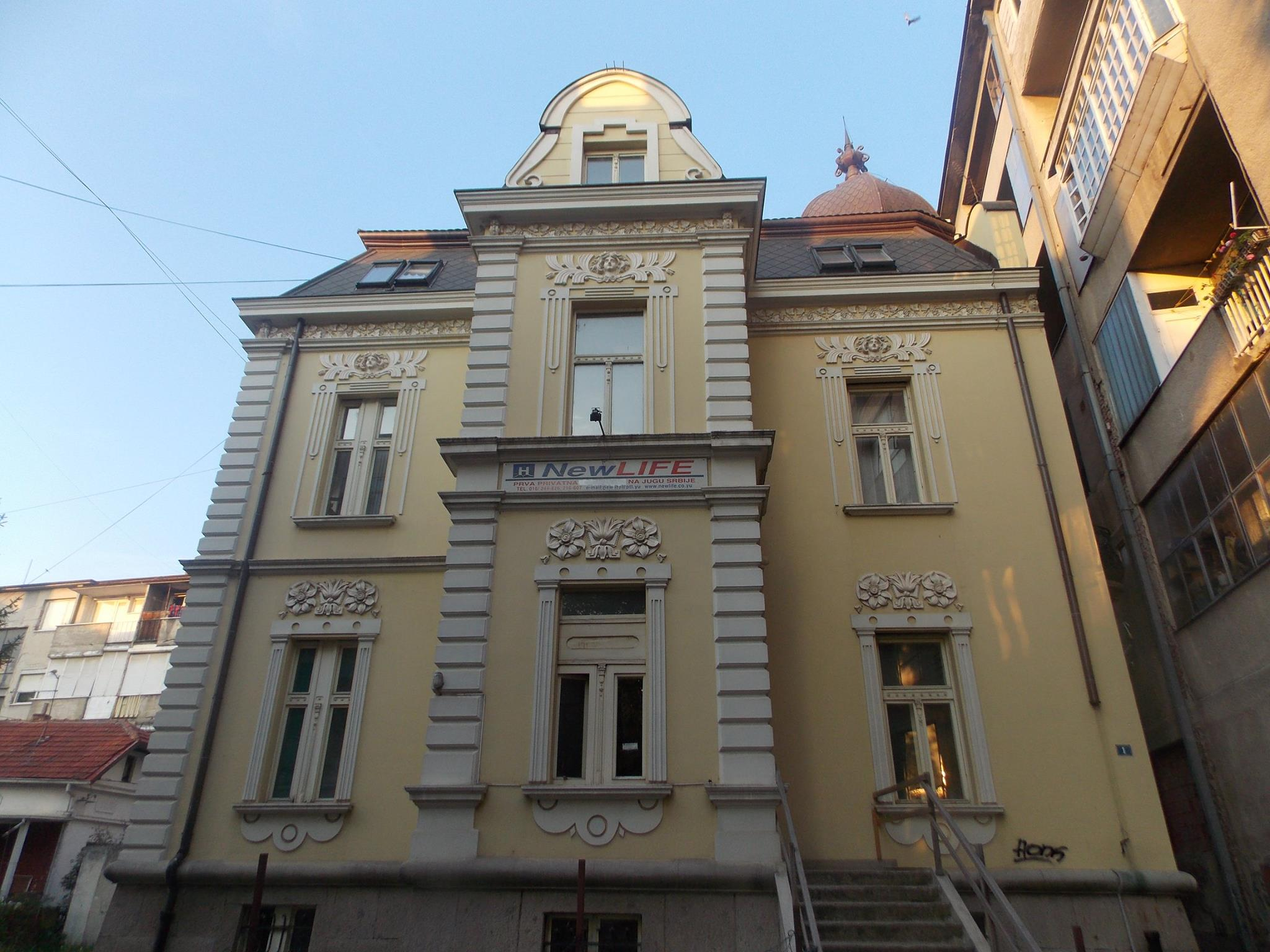 Српски (ћирилица): Палата Сотира Илића у Лесковцу